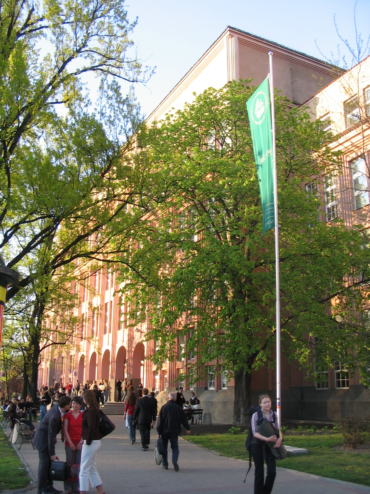 Warsaw School of Economics - main building ("G") Szkoła Główna Handlowa - budynek G